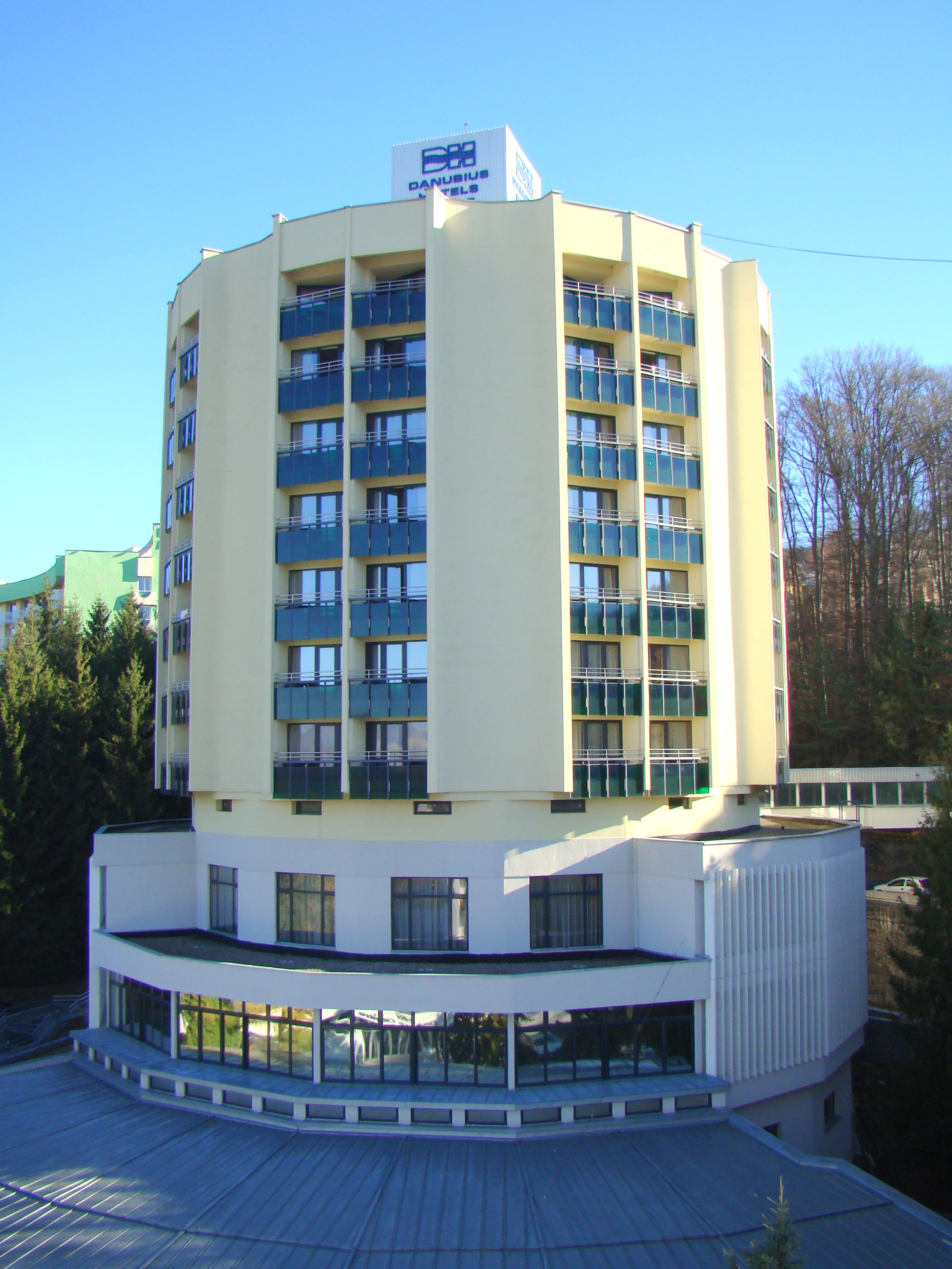 Hotel Brădet din Sovata